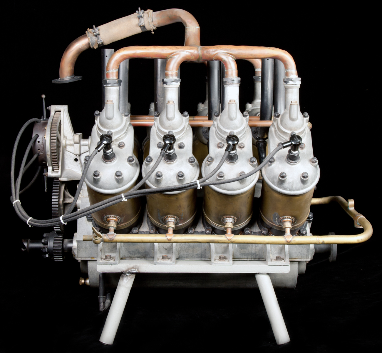 Motore aeronautico Antoinette, esposto al Museo nazionale della scienza e della tecnologia Leonardo da Vinci di Milano.